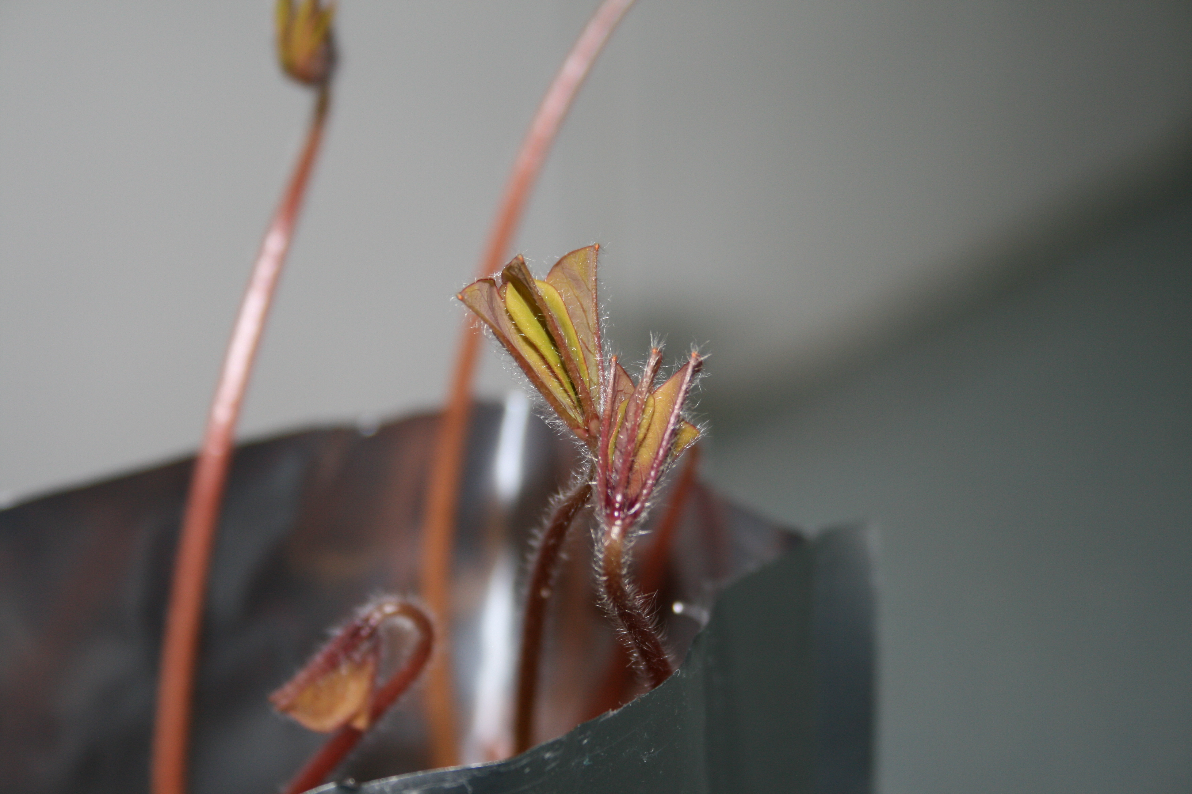 Glücklklee (Oxalis tetraphylla) Keimblätter